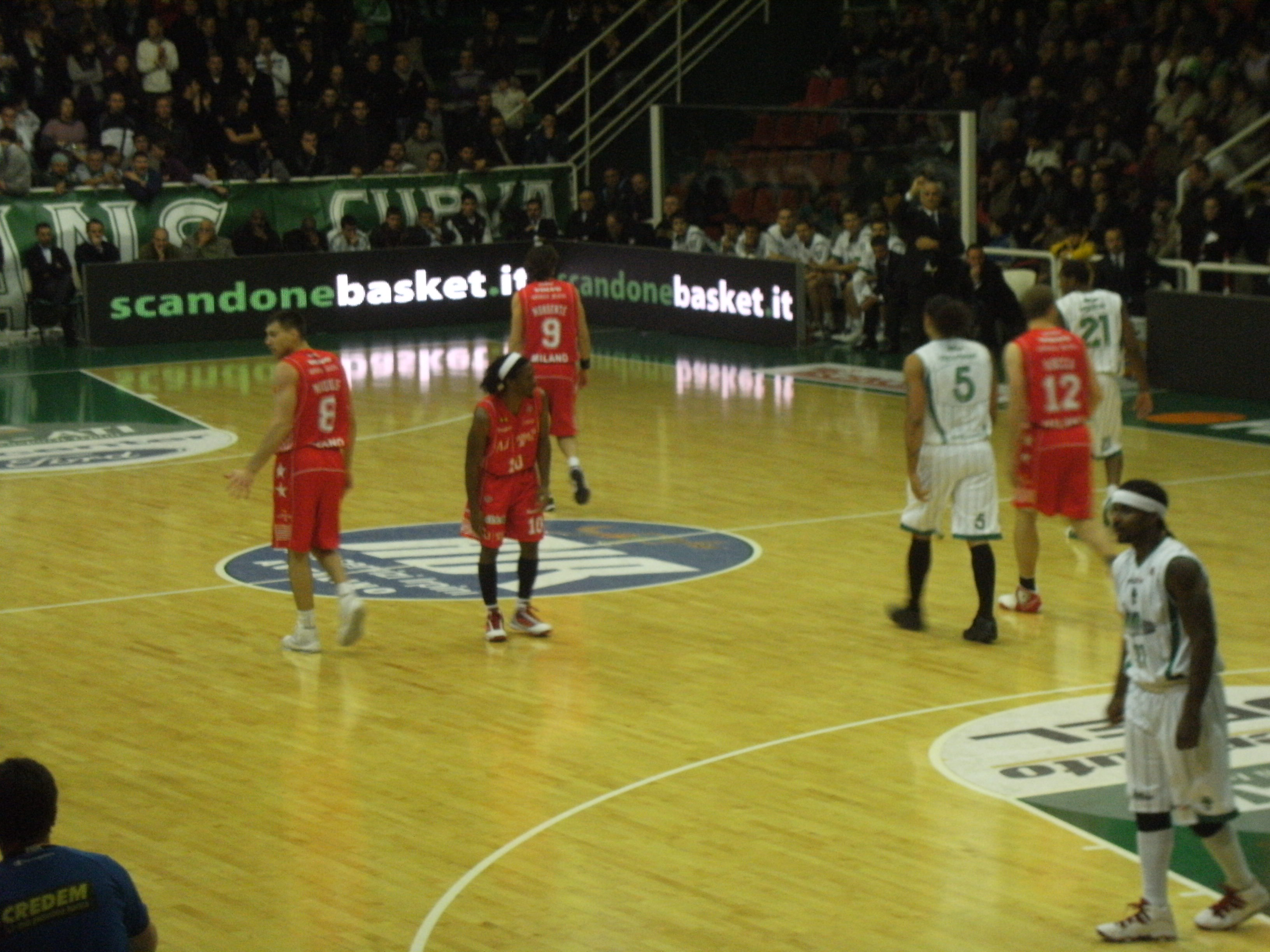 Felice Scandone - Olimpia Milano Palasport Giacomo Del Mauro di Avellino